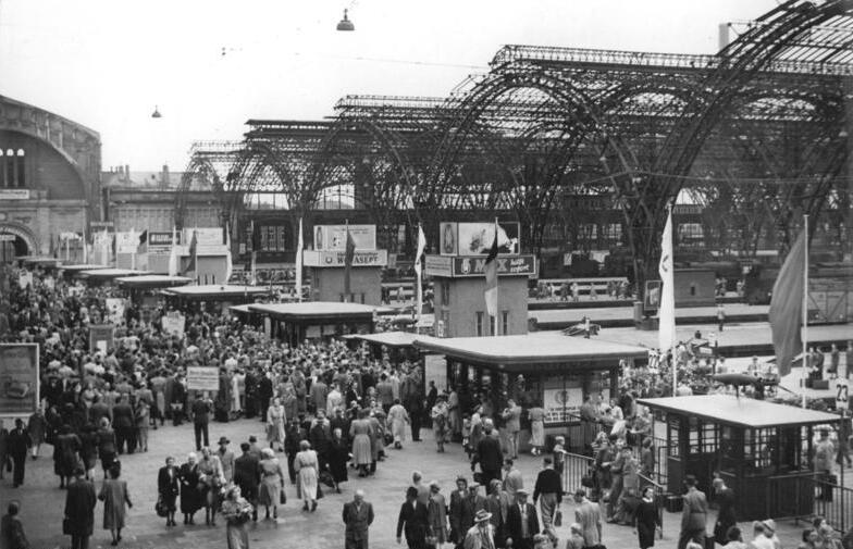 Leipzig, Hauptbahnhof Zentralbild Krueger 30.8.1953 Leipziger Messe 1953 Eröffung am 30.8.1953 UBz: Die Gäste kommen in Sonderzügen auf dem Leipziger Hauptbahnhof an.